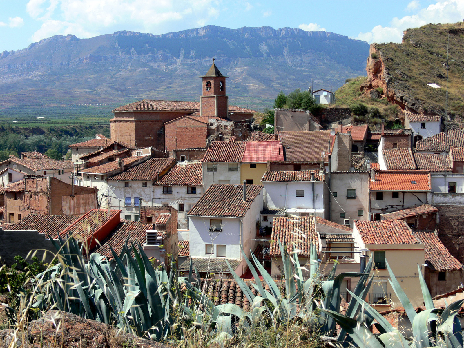 Herce, La Rioja - España.